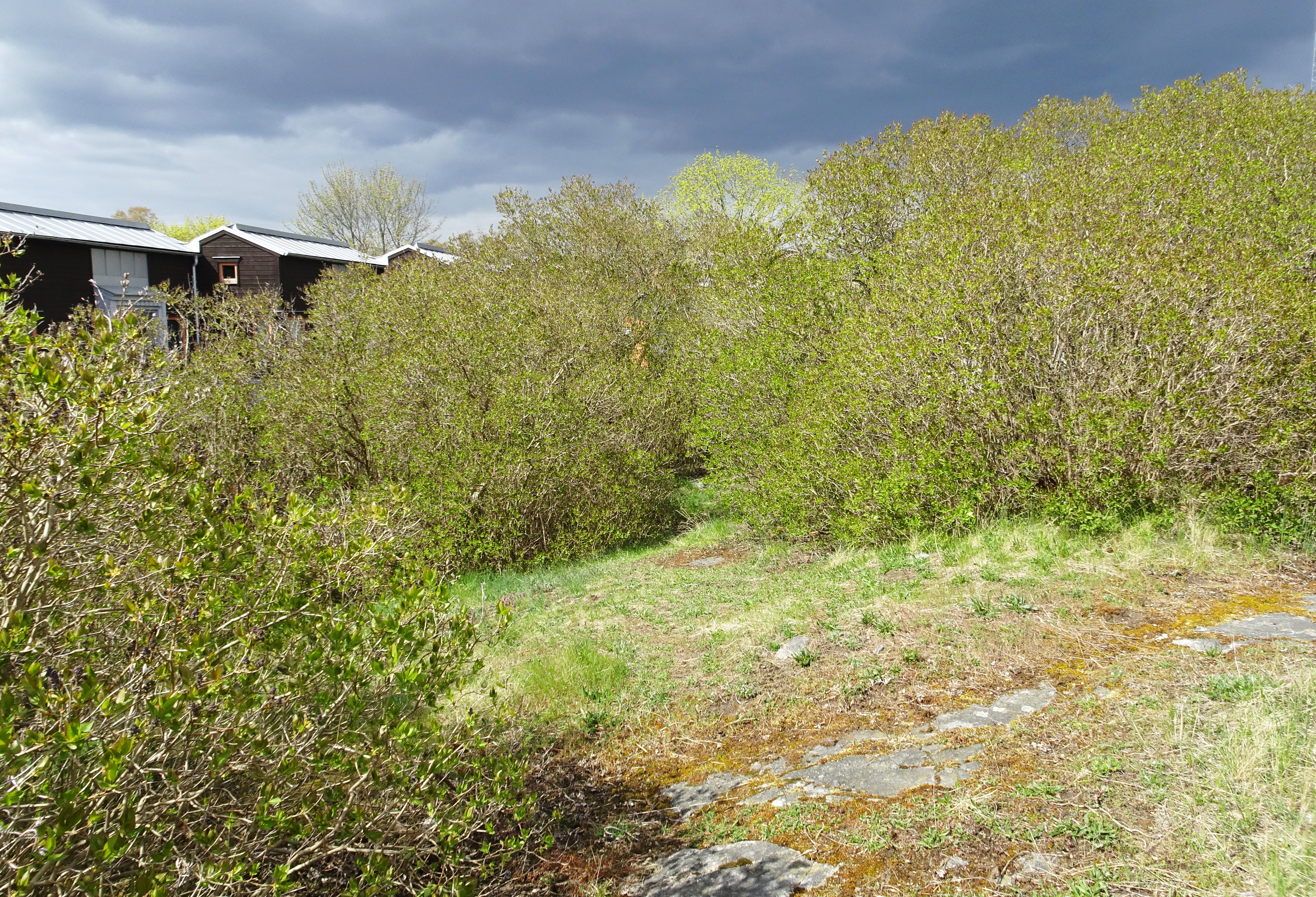 Torpet Anneboda tomtplats